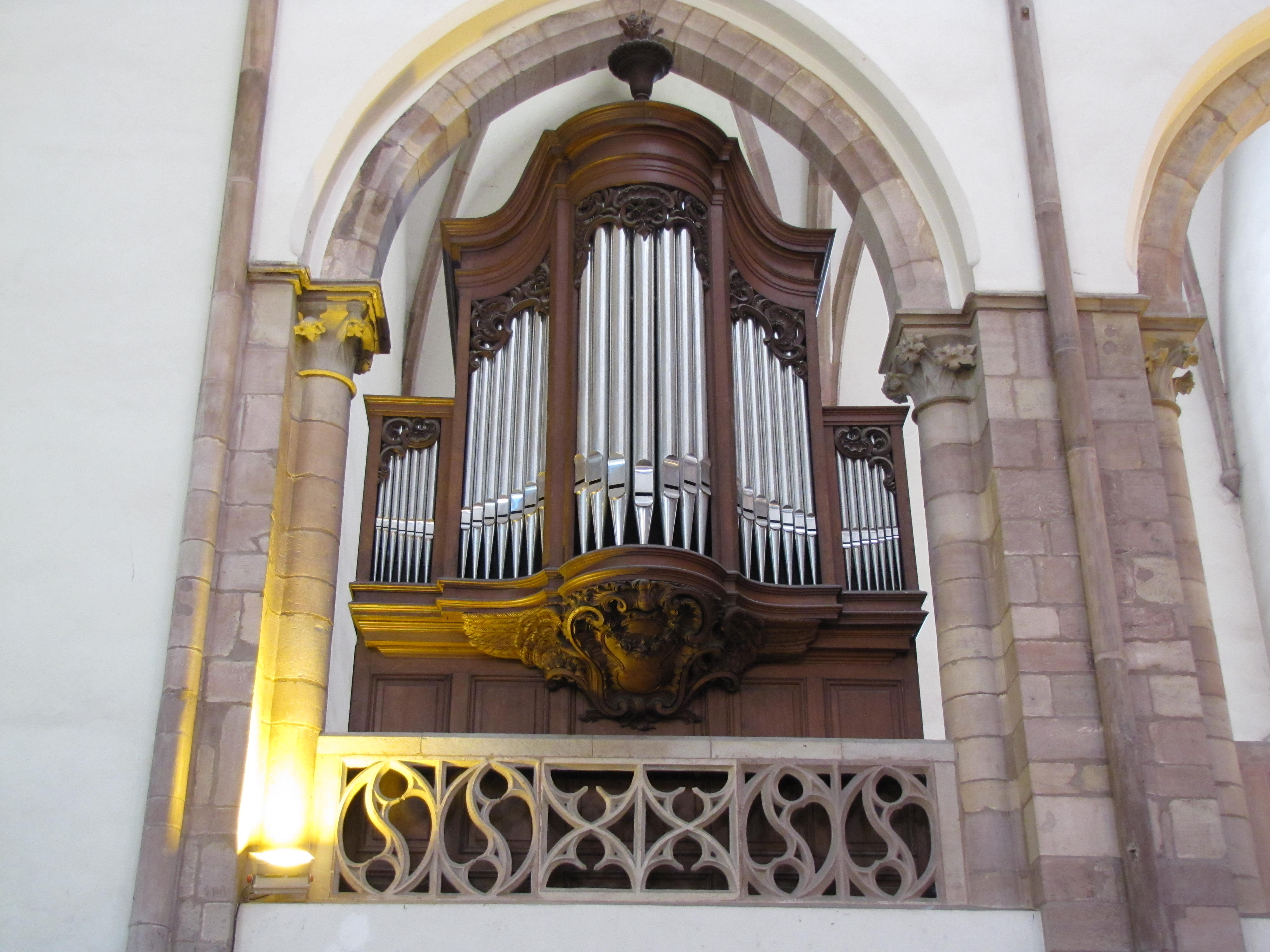 Alsace, Bas-Rhin, Église protestante Saint-Thomas de Strasbourg, 4 rue Martin-Luther (PA00085032).Orgue de choeur Dalstein-Haerpfer-Blumenroeder (1905)